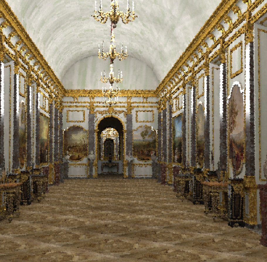 Schéma de la galerie du château-vieux de Meudon décorée sous Louvois.